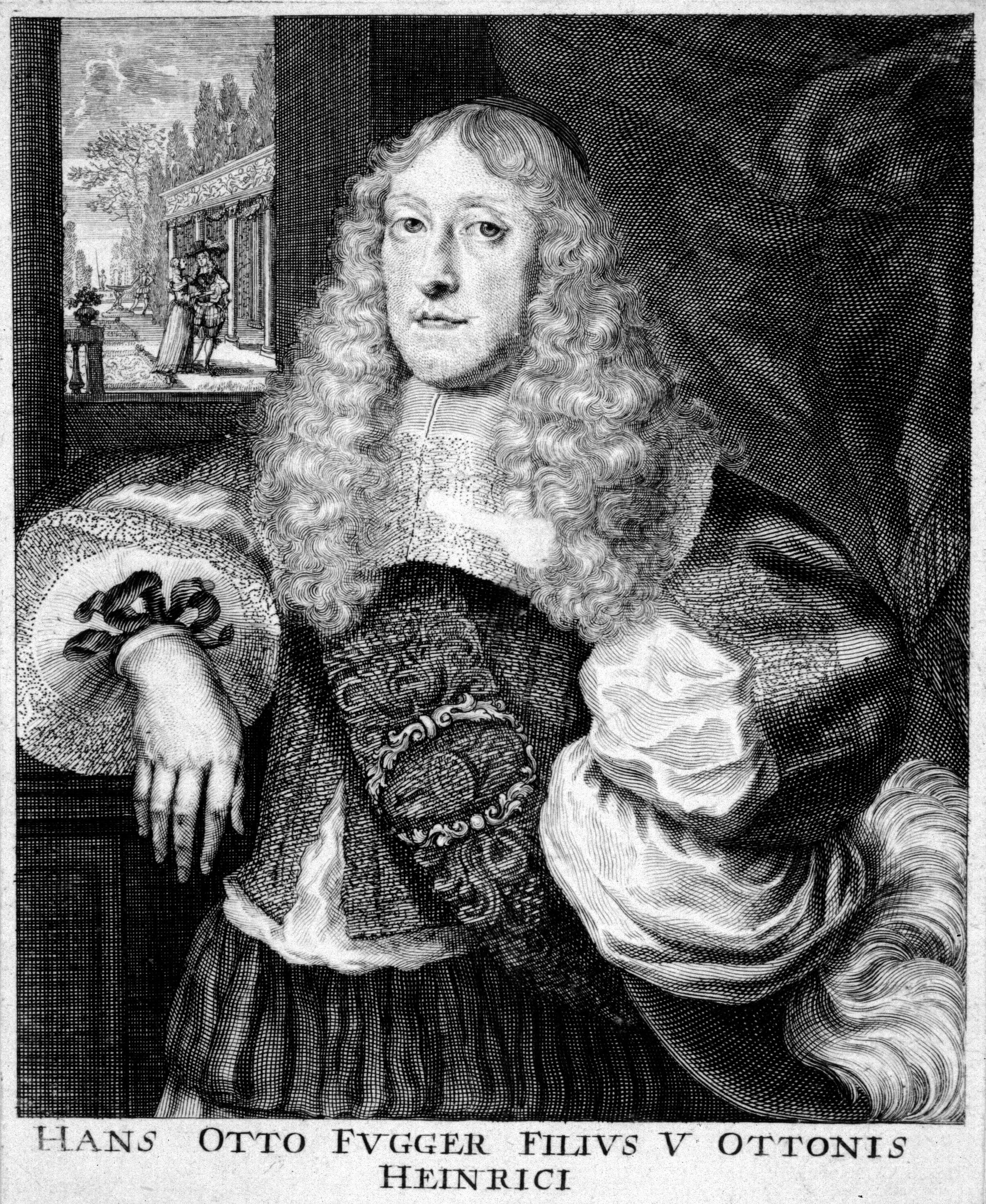 Porträtstich des Hans Otto Fugger (1631–1687)